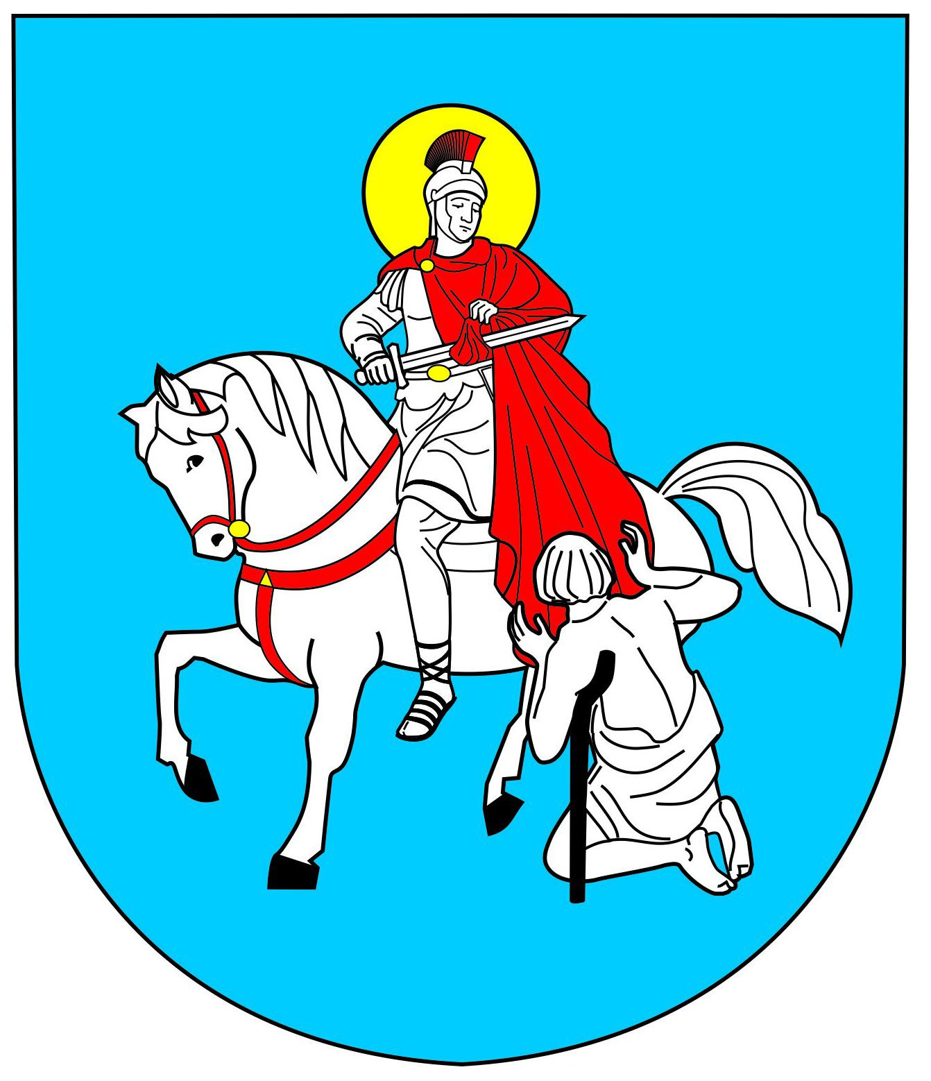 Nowy herb sołectwa Golasowice